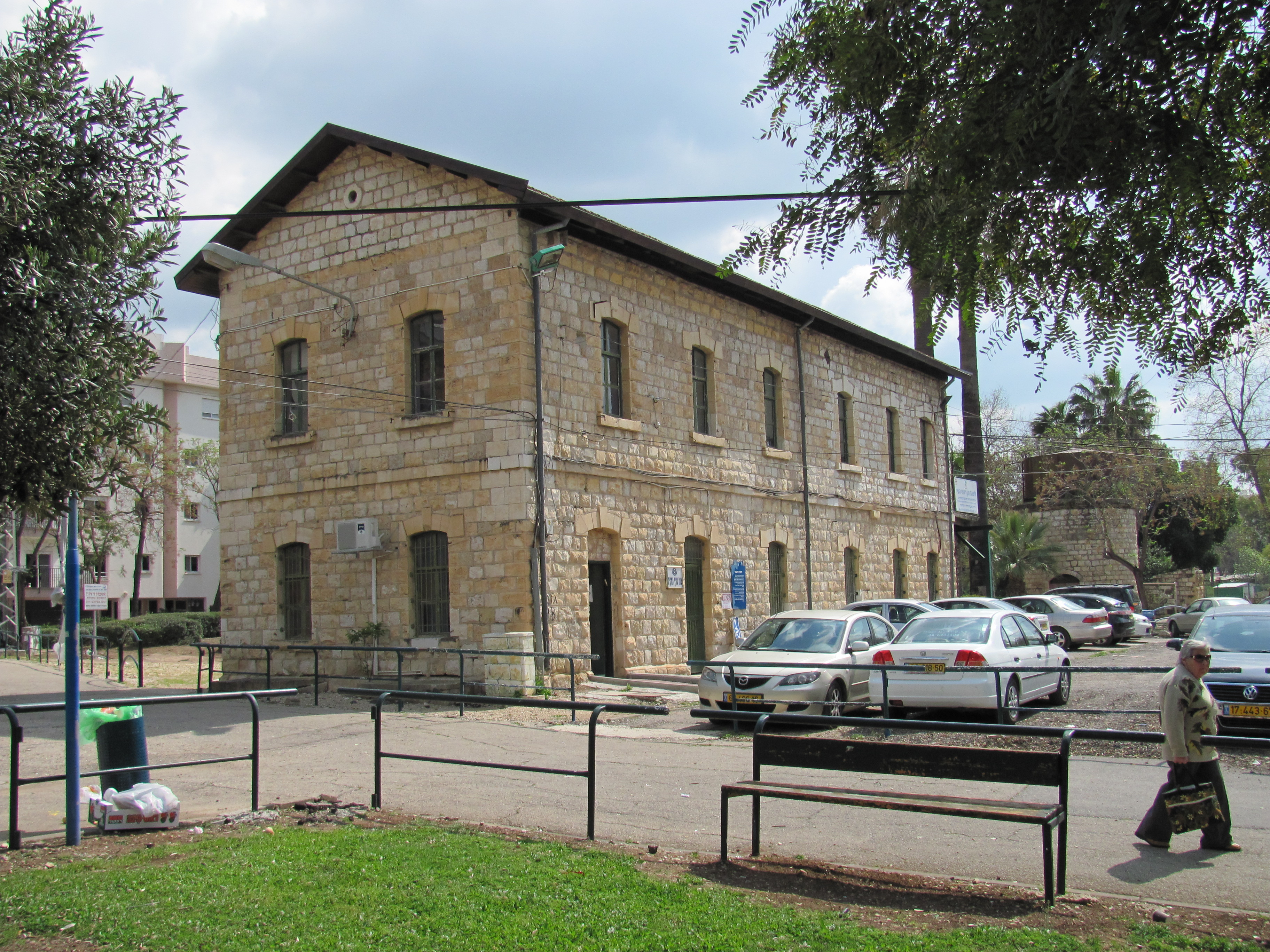 בניין תחנת רכבת עפולה הישנה מבת אחורי